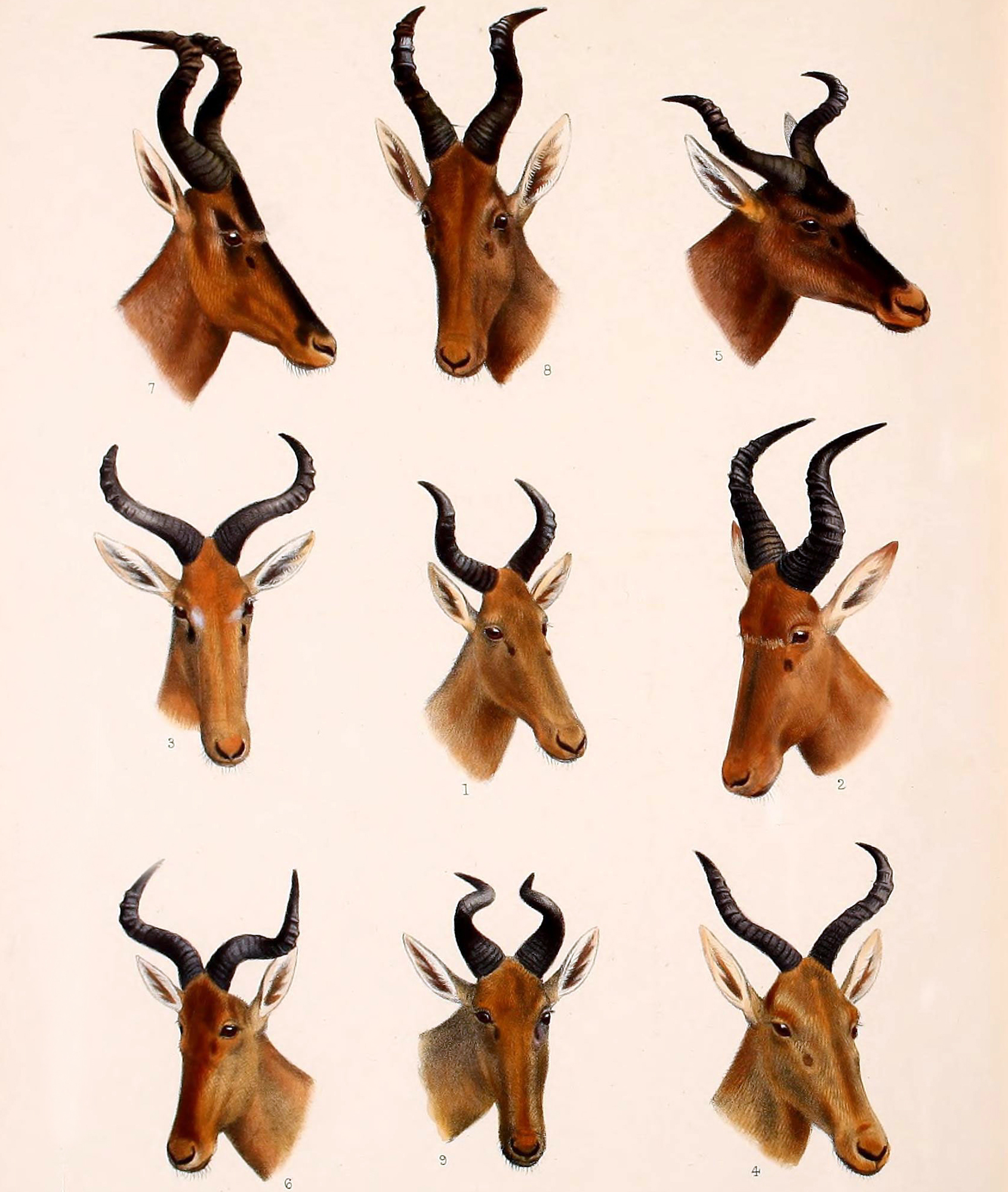 1 Bubal Hartebeest 2 West African hartebeest 3 Tora hartebeest 4 Neumann’s hartebeest 5 Swayne’s hartebeest 6 Coke’s hartebeest 7 Cape hartebeest 8 Jackson’s hartebeest 9 Lichtensteins’s hartebeest